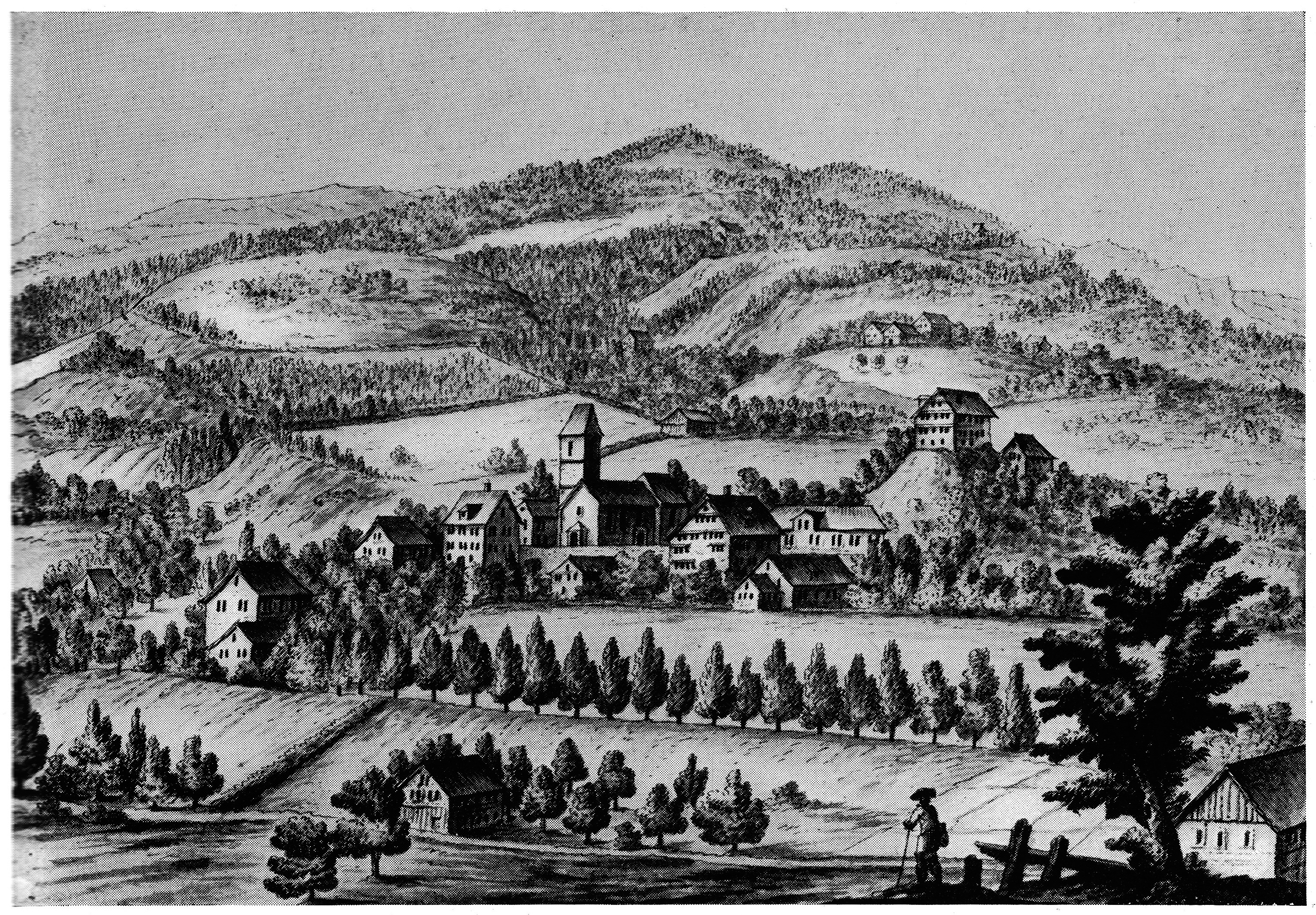 Anſicht des Dorfs Wald im Zürichbiet.